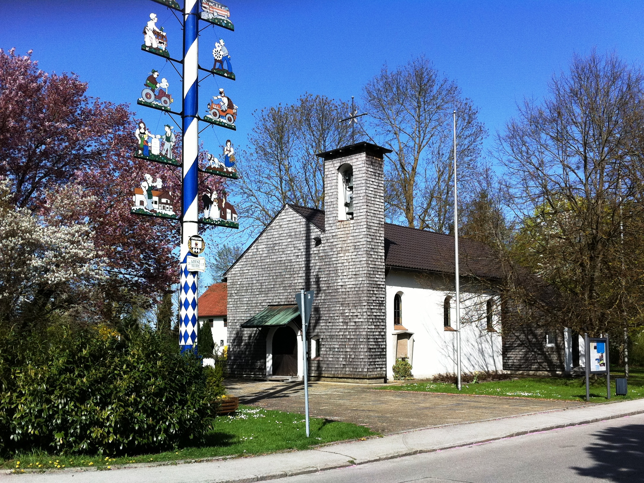 Kirche St. Kolomann und Maibaum im Ortszentrum von Fischerhäuser, Gemeinde Ismaning, Landkreis München, Bayern